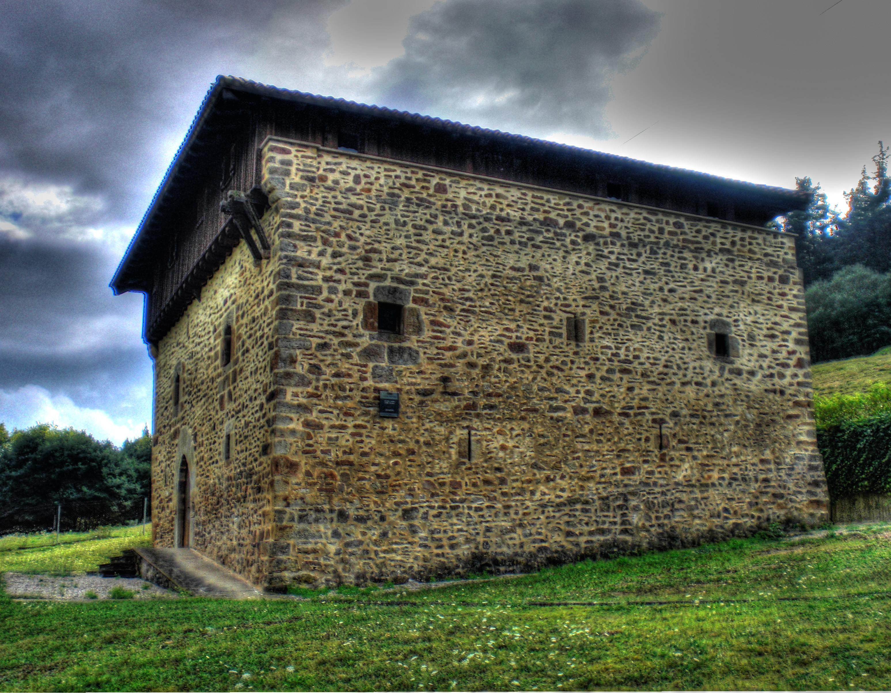 Aiarako Zuhatzako Negorta dorretxea